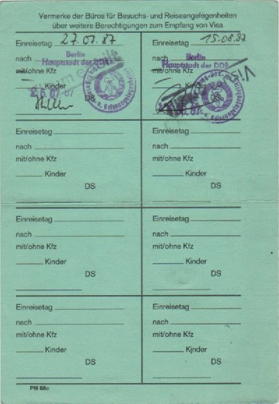 Rückseite eines Berechtigungsscheins zum mehrmaligen Empfangs eines Visums